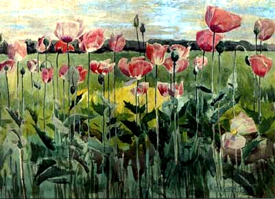 Gemälde von Karl Hagemeister, im Vordergrund blühender Mohn (Papaver sp.), dahinter Felder